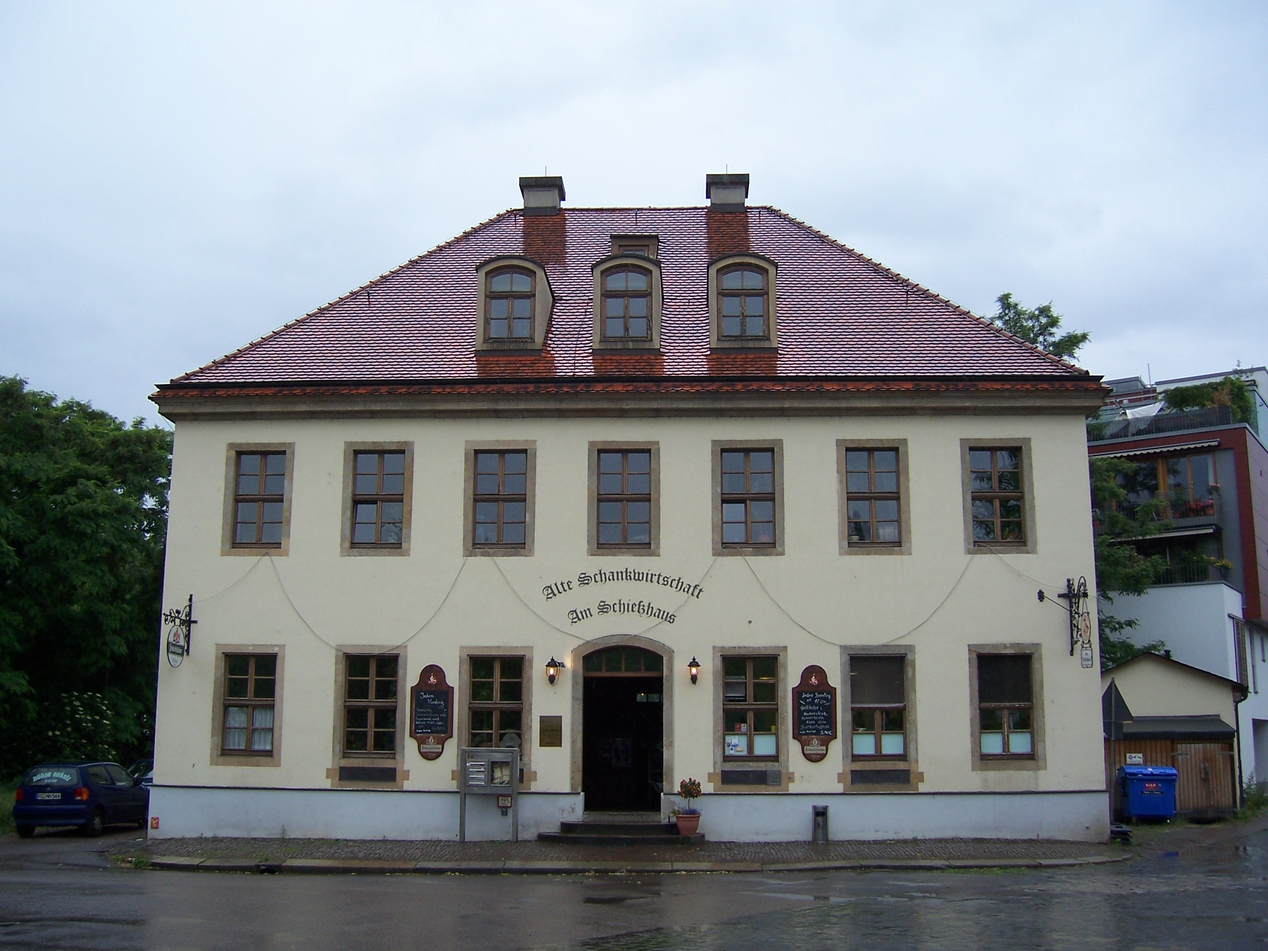 Barockes Schießhaus in der Wilsdruffer Vorstadt in Dresden